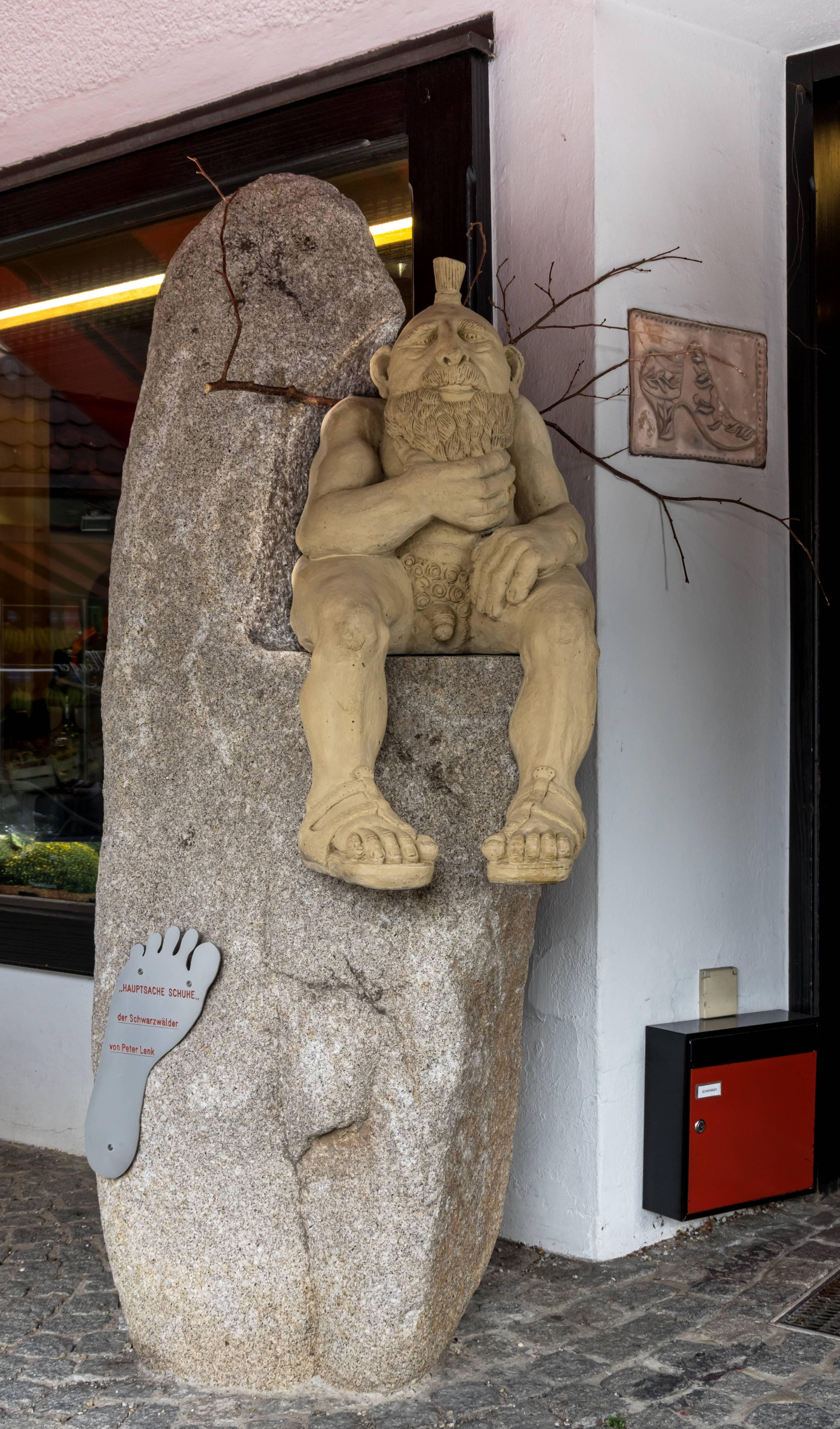 Bilder aus dem Ortsteil Neustadt der Stadt Titisee-Neustadt Der Schwarzwälder von Peter Lenk